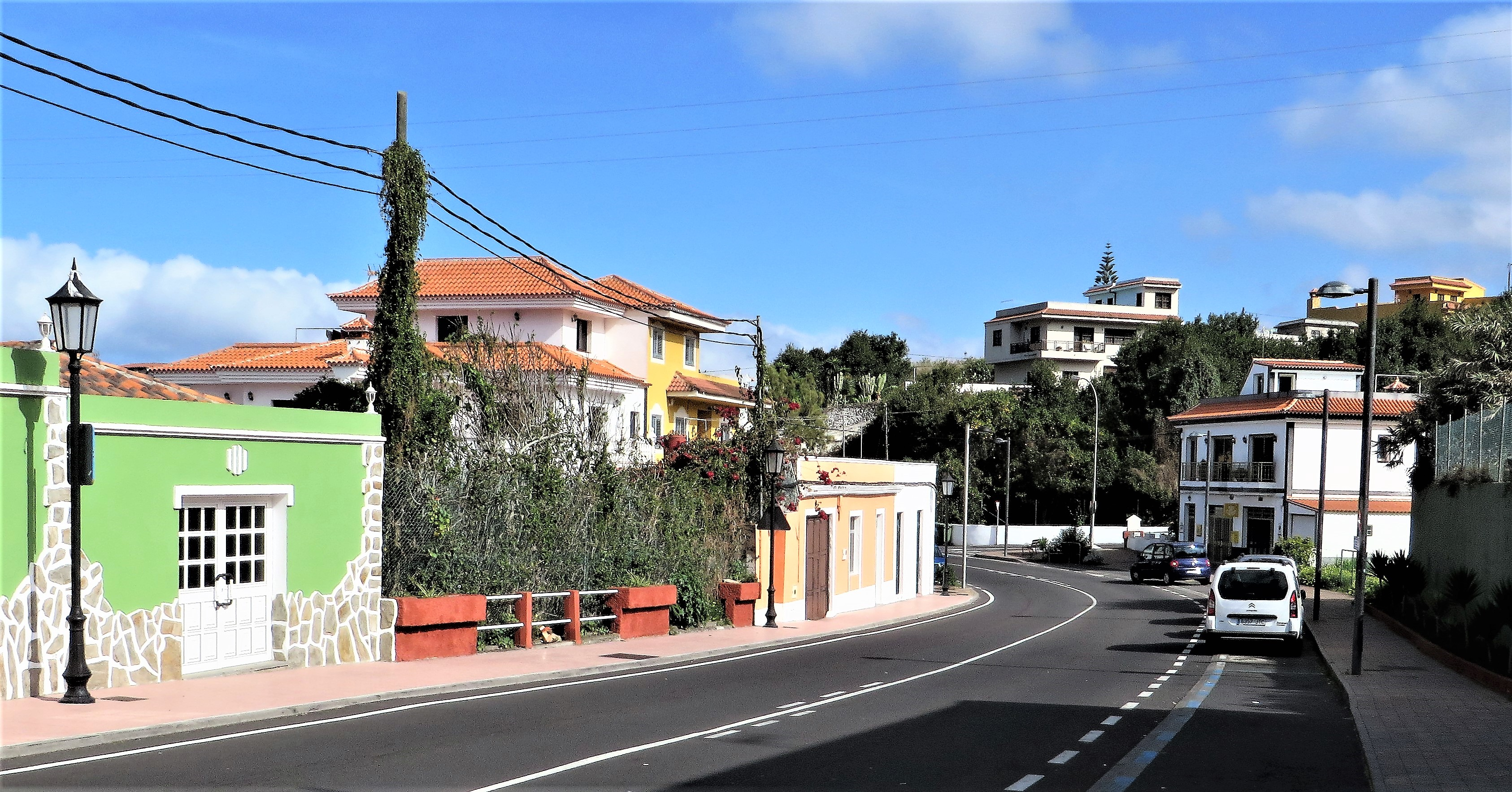 El Tanque (Teneriffa), Ortsdurchfahrt